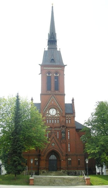 Andreaskirche in Chemnitz